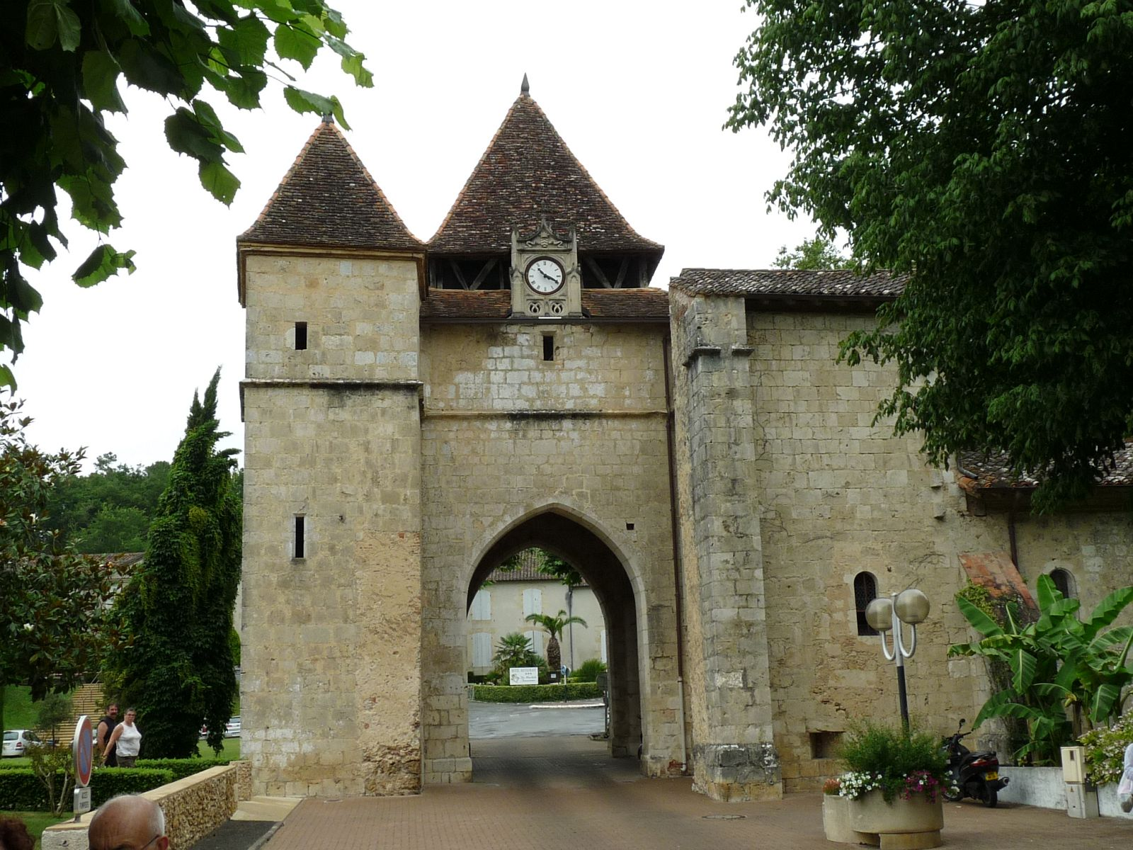 Eglise-porte de Barbotan (32), France